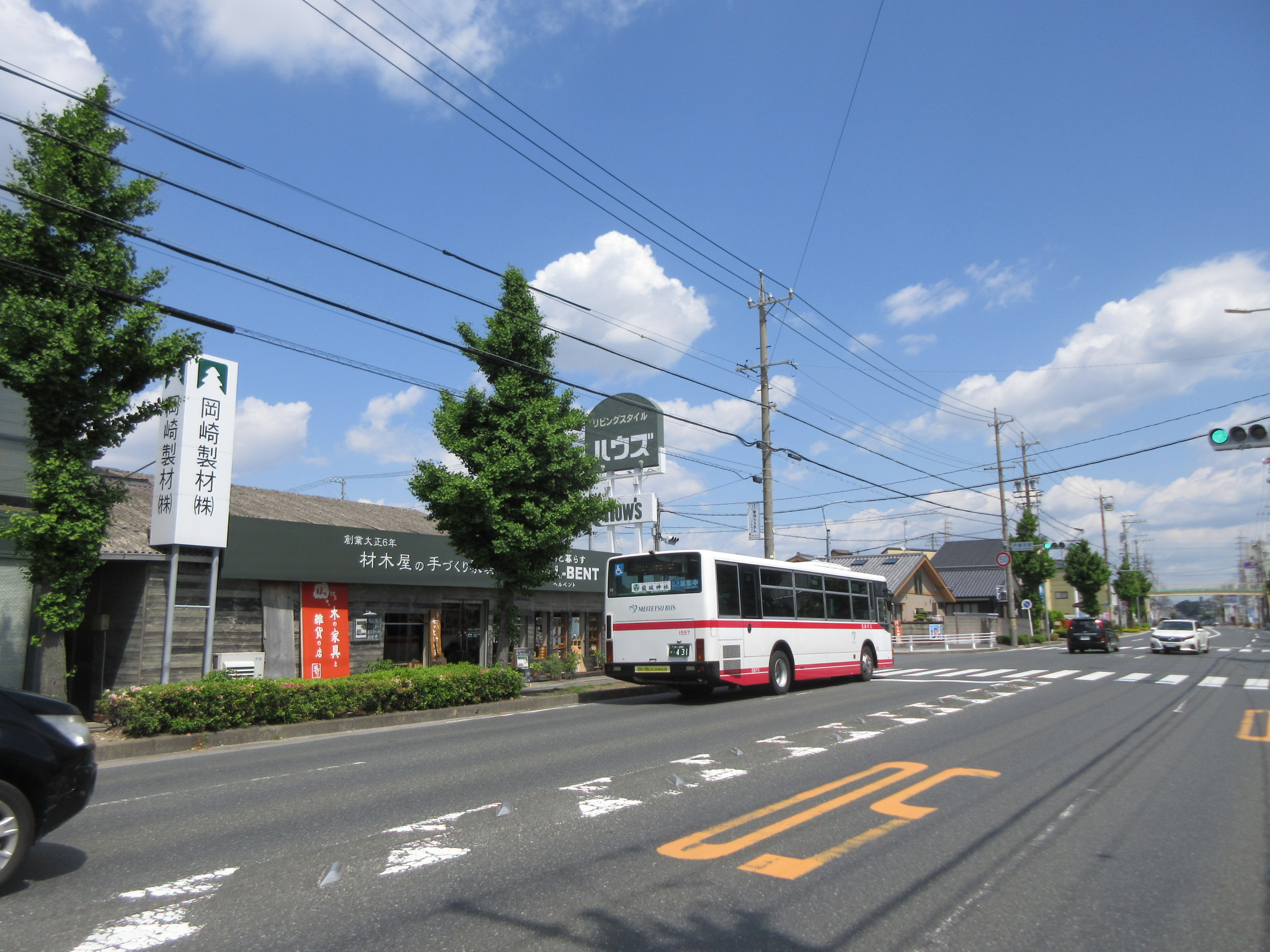 愛知県岡崎市、戸崎元町交差点